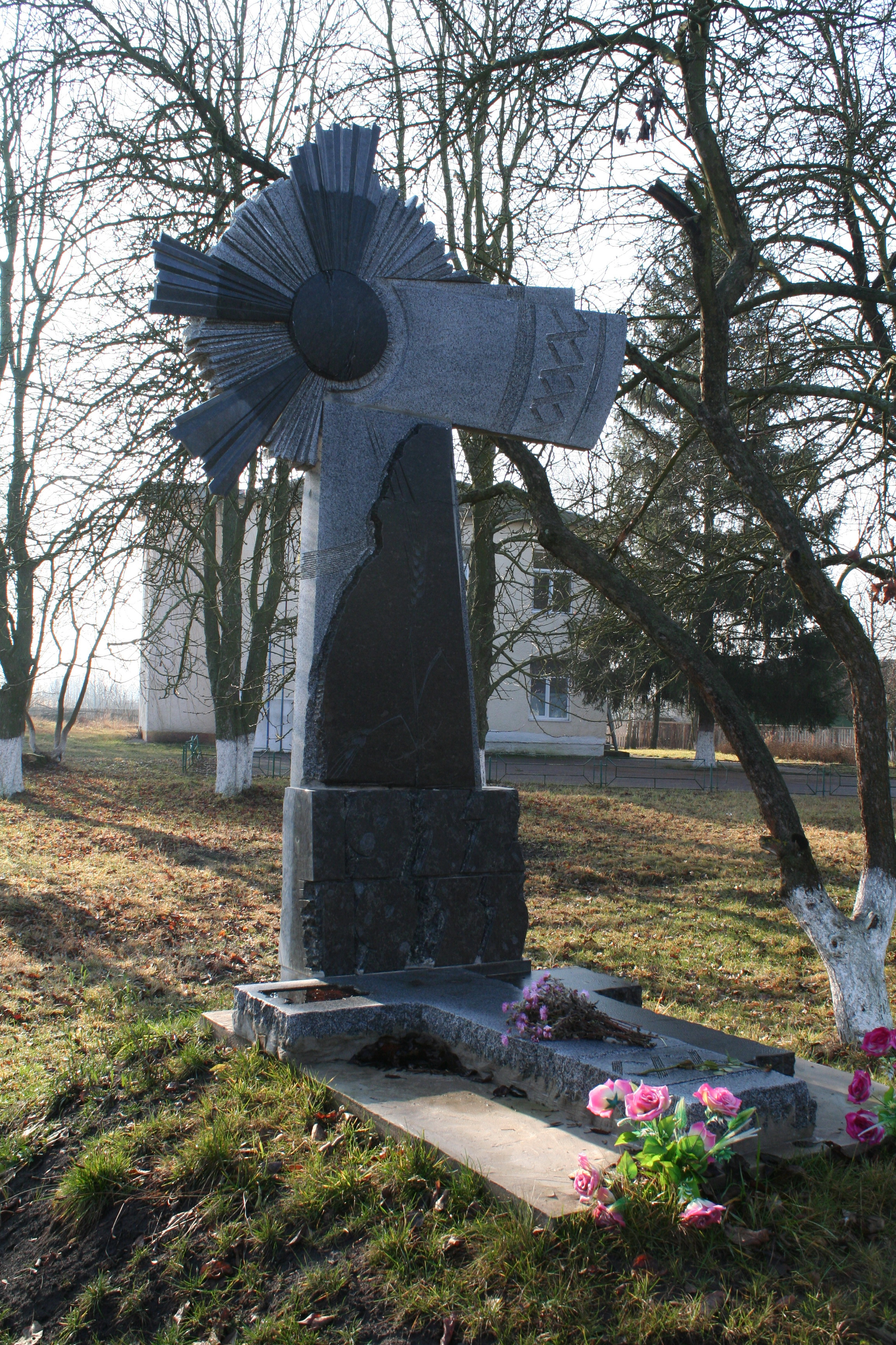 Пам’ятний знак жертвам Голодомору 1932-1933 років, с. Борівка, центр села біля магазину, загальний вигляд, ліворуч в три чверті